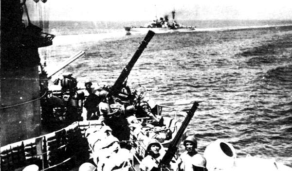 Il Garibaldi a poppa dell'unità gemella, l'incrociatore Duca degli Abruzzi, di cui si notano le mitragliere da 13,2mm e da 37/54mm